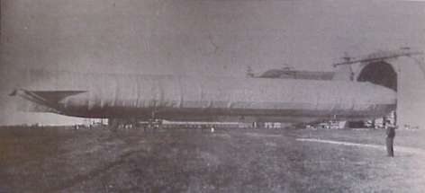 L 7 på vej ind i Toni hallen i Tønder